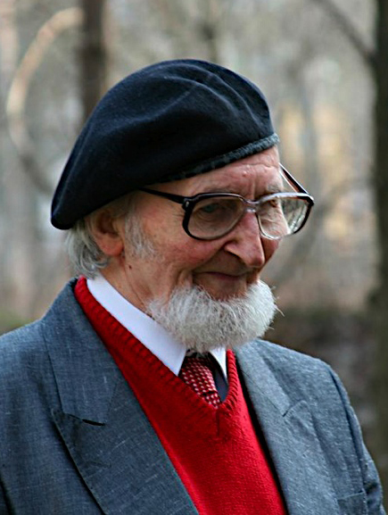 2008 m. balandis, Vilnius